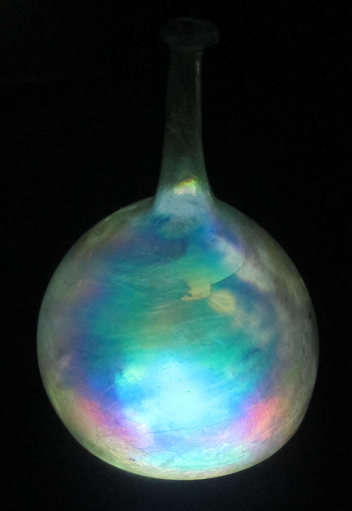 Bodrum, arte islamica, bottiglie, XI sec